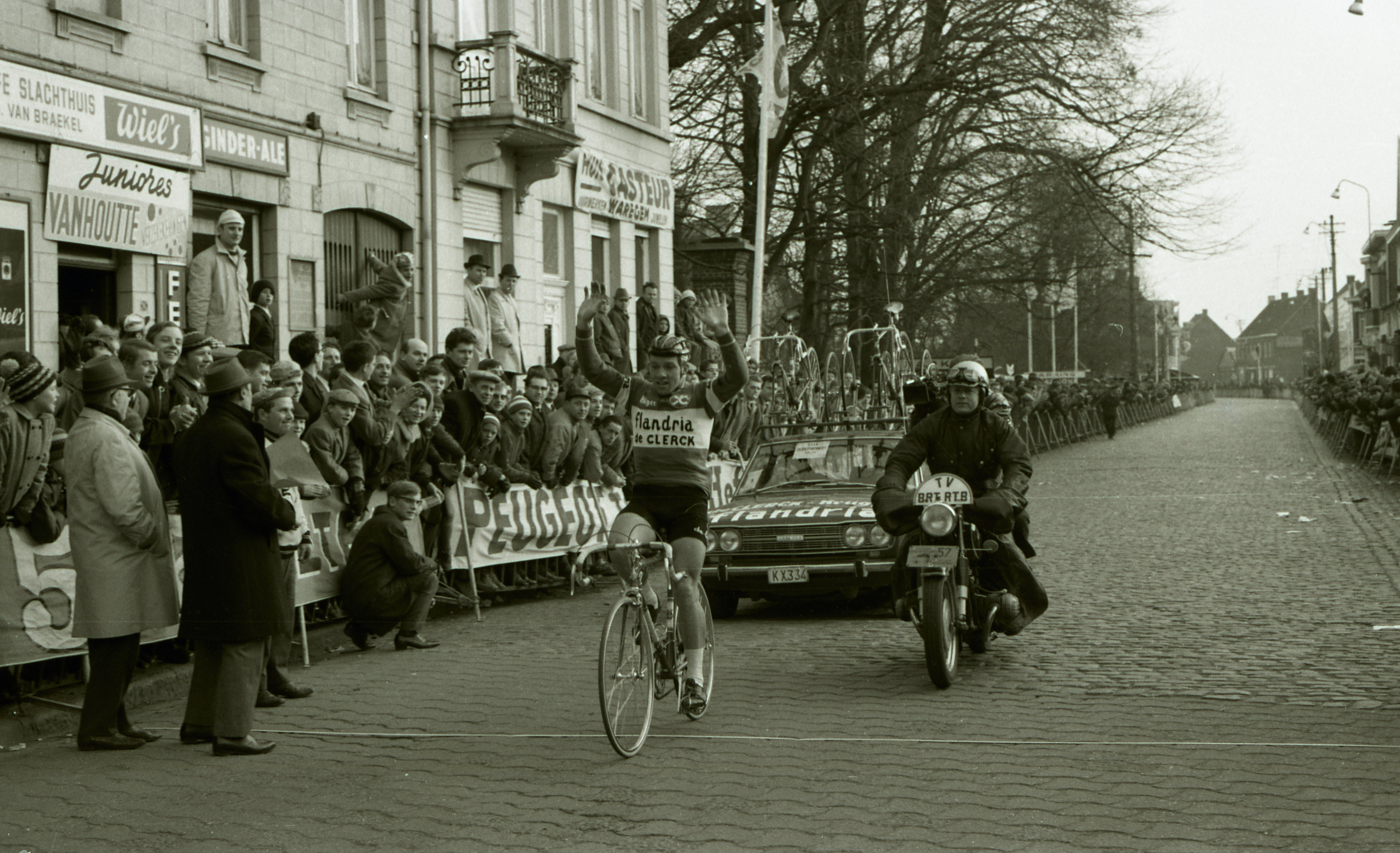 Eric Leman is in 1969 de beste in Waregem. Daarmee wint voor het tweede jaar op rij een renner uit de Flandria-ploeg van sportdirecteur (en Waregemnaar) Briek Schotte.